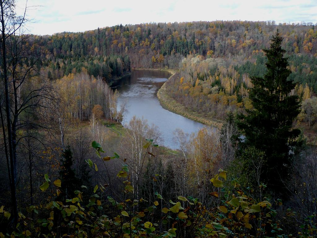 Sigulda, Ķeizarskats 2008-10-18